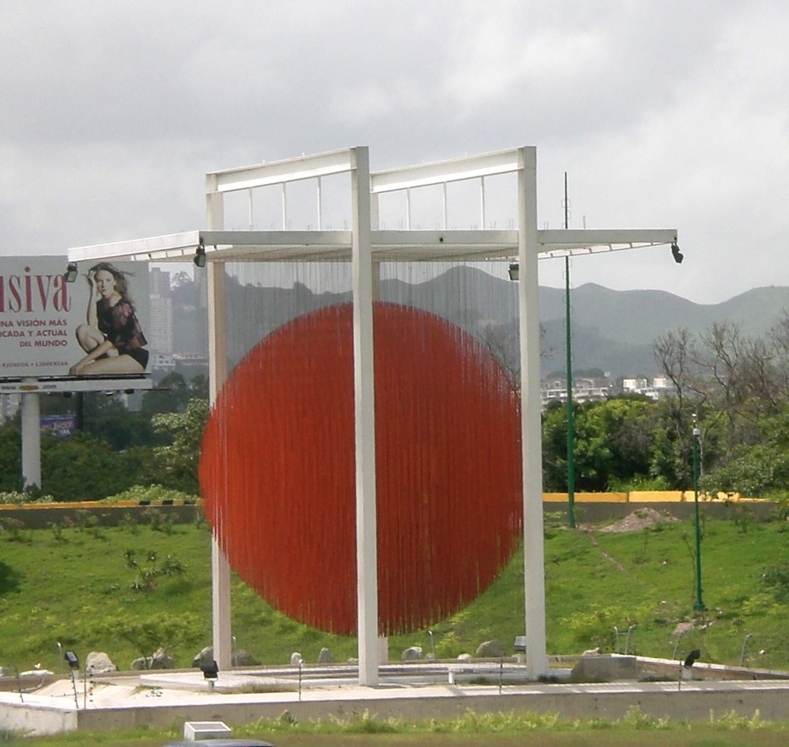 Soto Sphere, Caracas, Venezuela